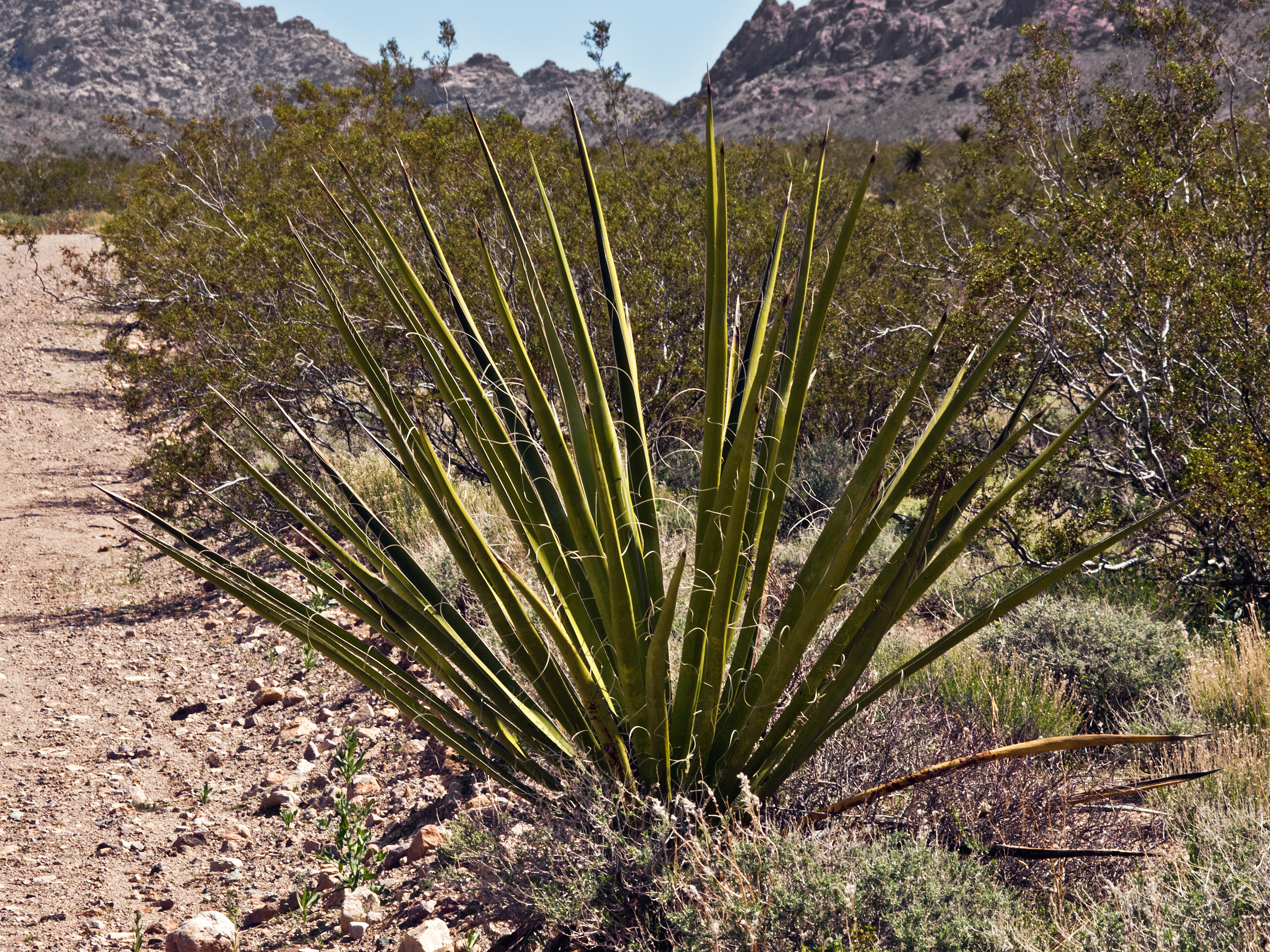 A desert plant.